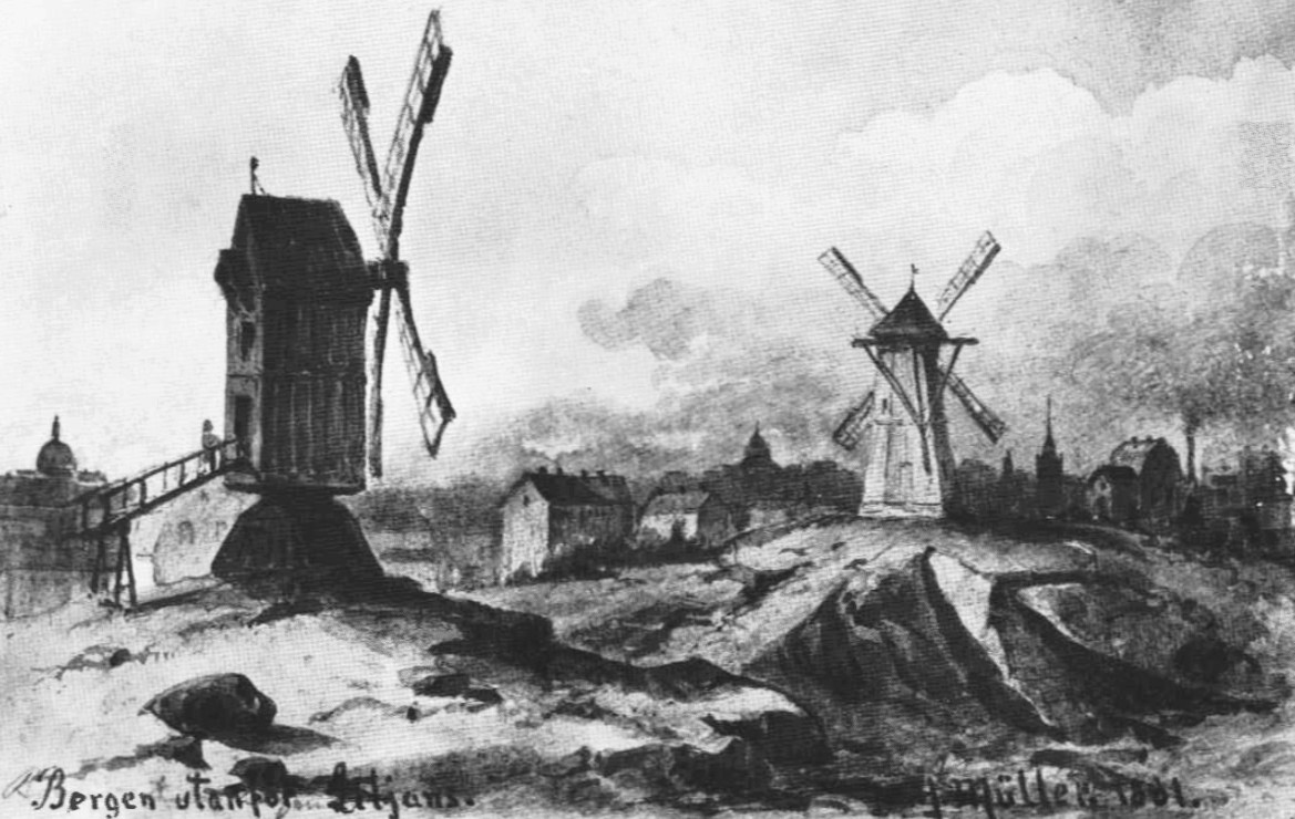 Akvarell signerad H Muller 1881. T.v. kvarnen på platsen för nuvarande Engelbrektskyrkan i Lärkstaden. Byggnadsår 1775 enligt följel. Till höger kvarnen på Eriksberg byggd 1805 snickaråldermanen Johan Starck